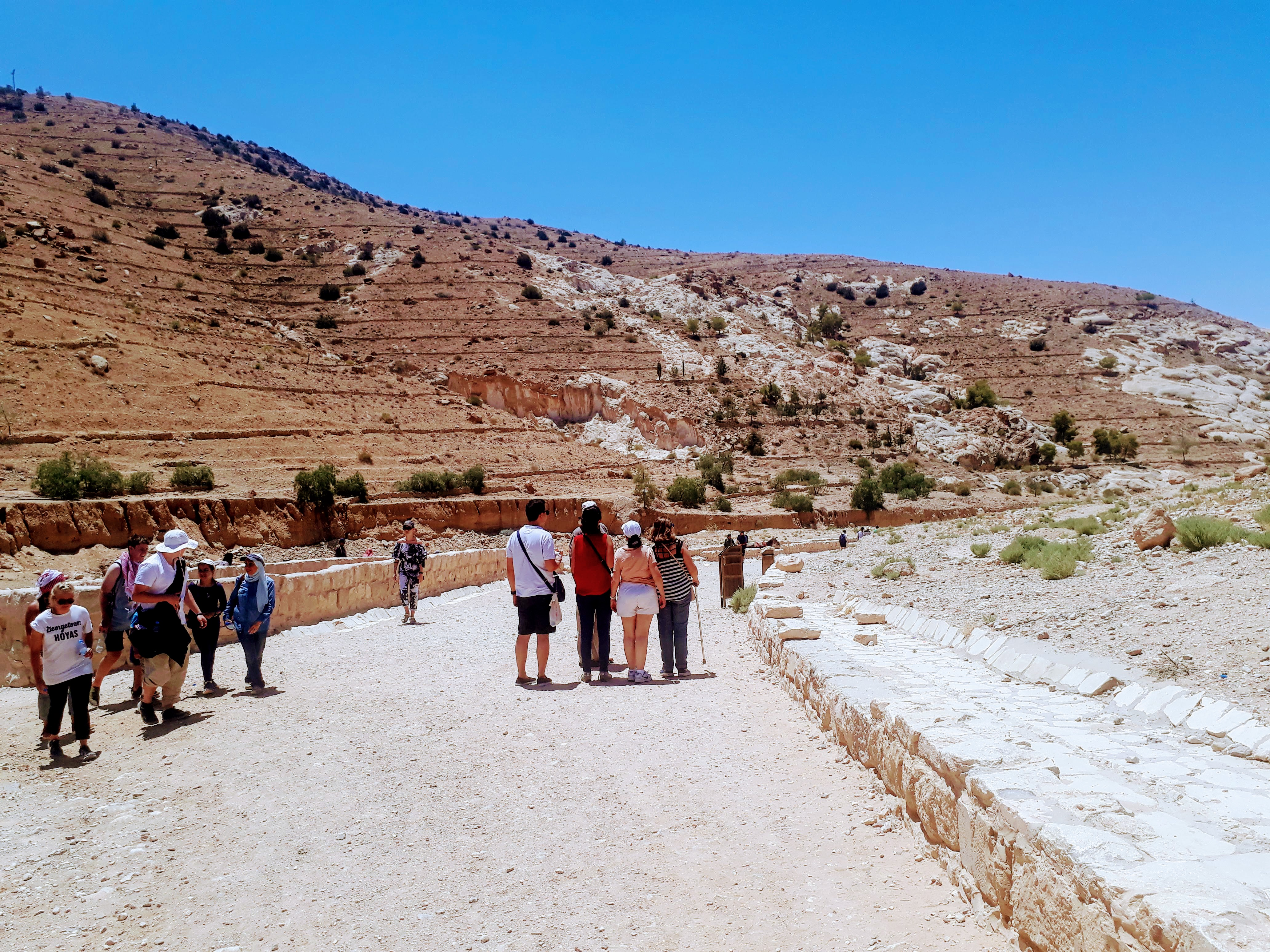 പ്രവേശന കവാടം കഴിഞ്ഞാൽ ആദ്യം കാണുന്ന നടവഴി ഇതിലൂടെ രണ്ടര കിലോമീറ്റർ മലയിടുക്കിലൂടെ നടന്നാൽ ട്രഷറിയിൽ എത്താം